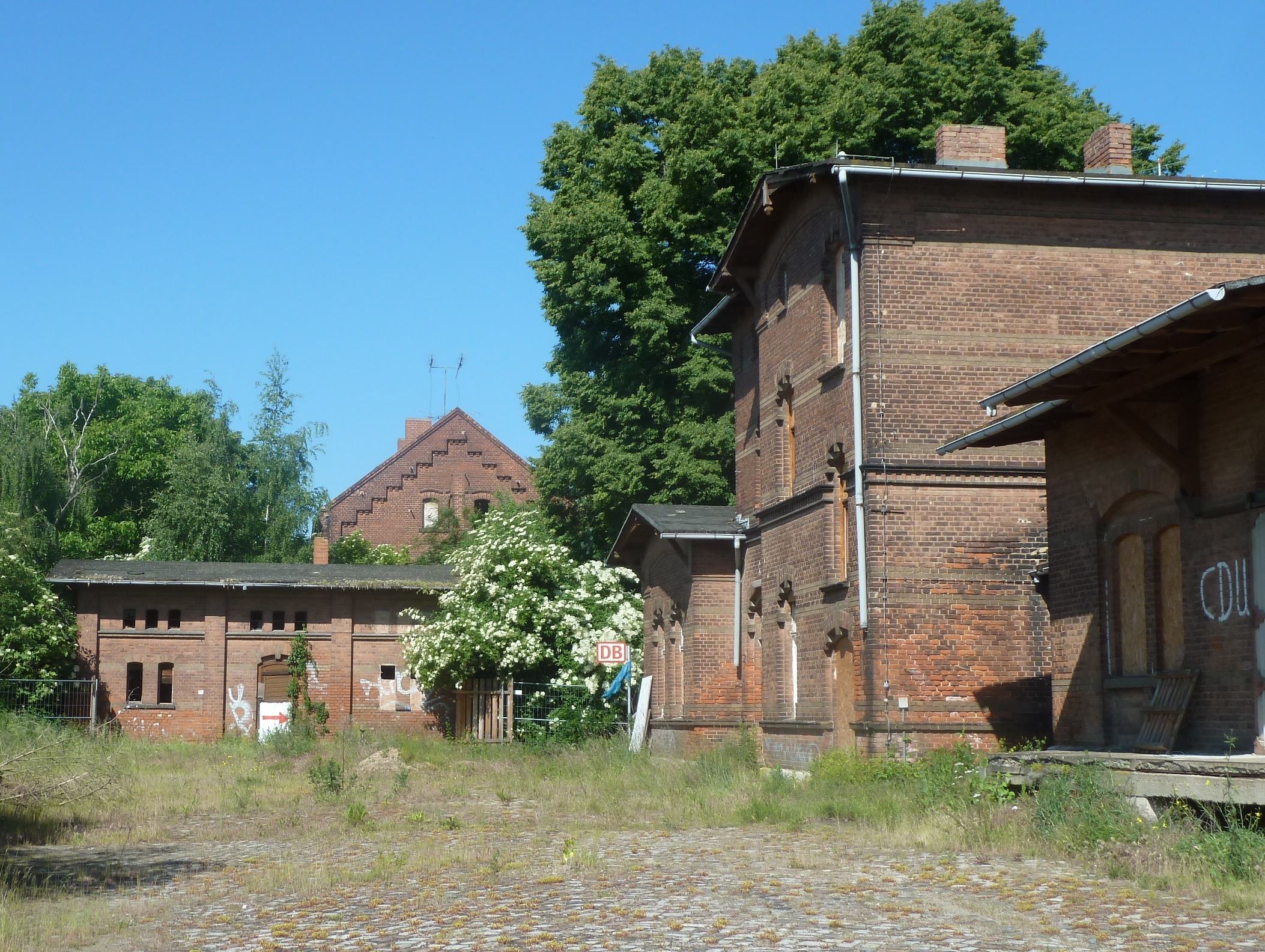 Bahnhof Ilberstedt, Kulturdenkmal, Straßenseite